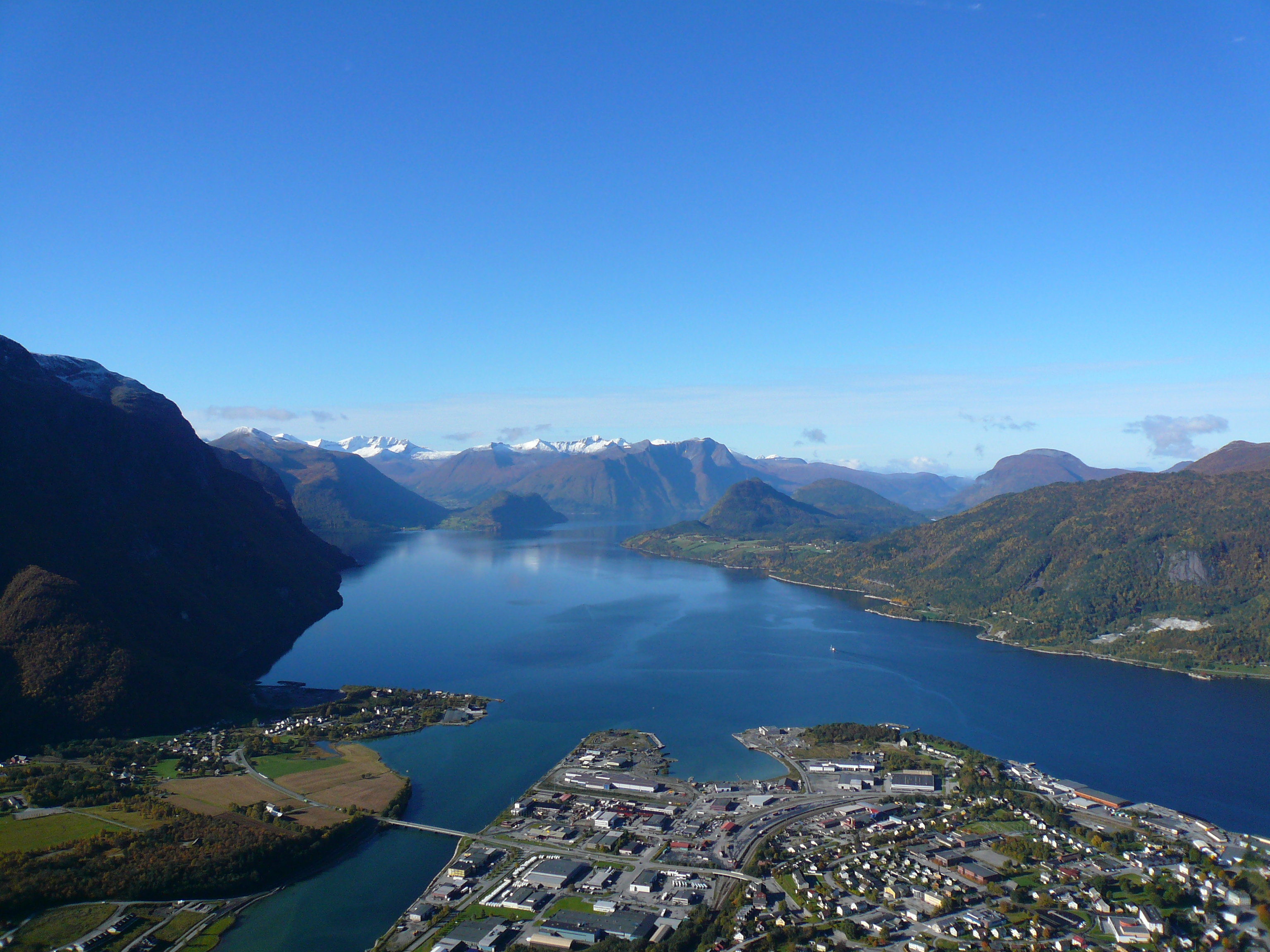 Åndalsnes